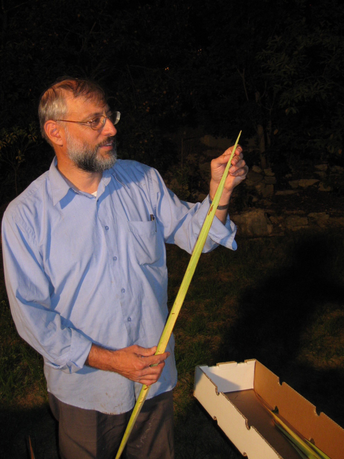 בדיקת לולב בשוק ארבעת המינים בקדומים רישיון נוצר על ידי משתמש:Daniel Ventura